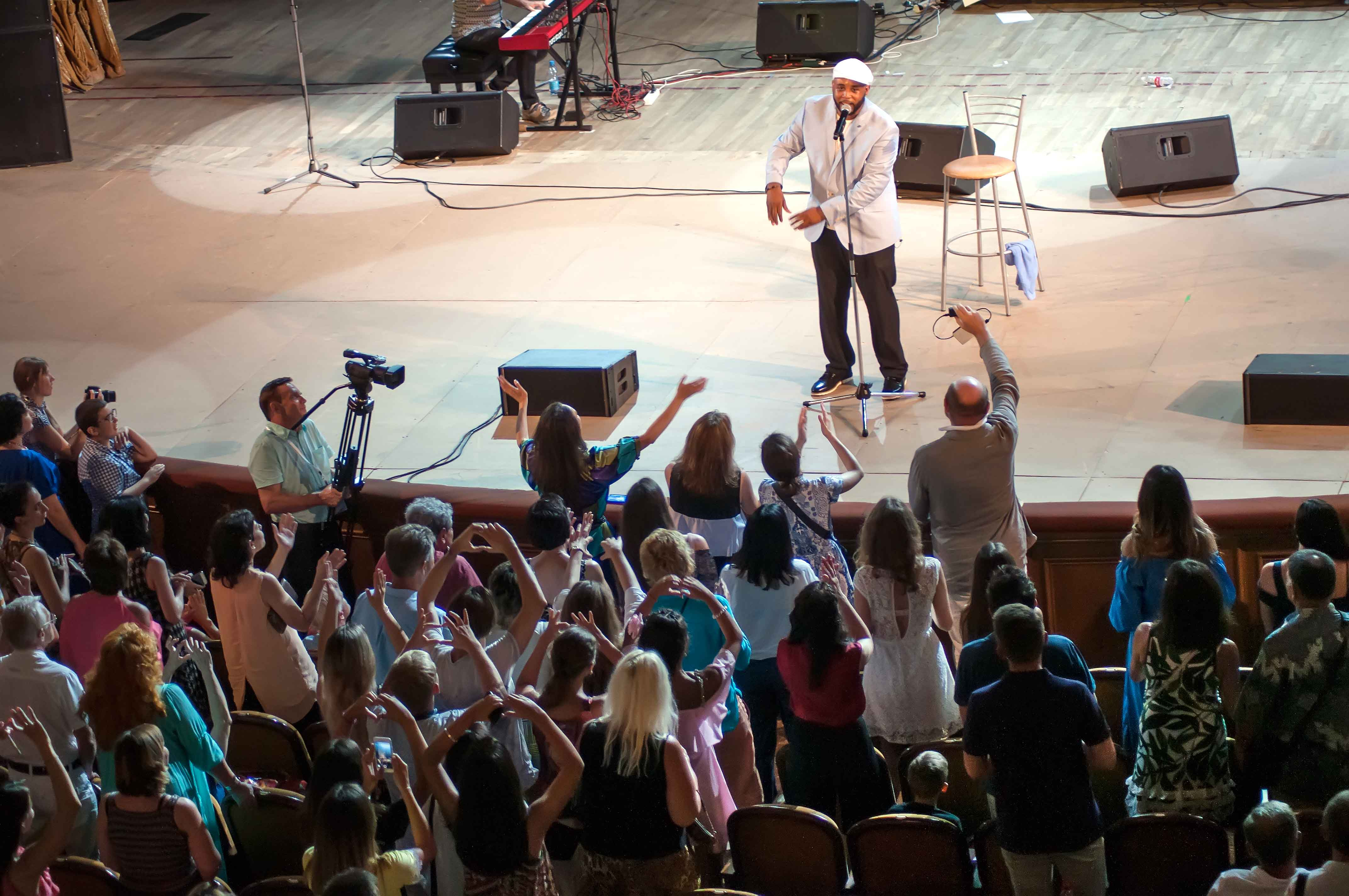 Sochi Jazz Festival